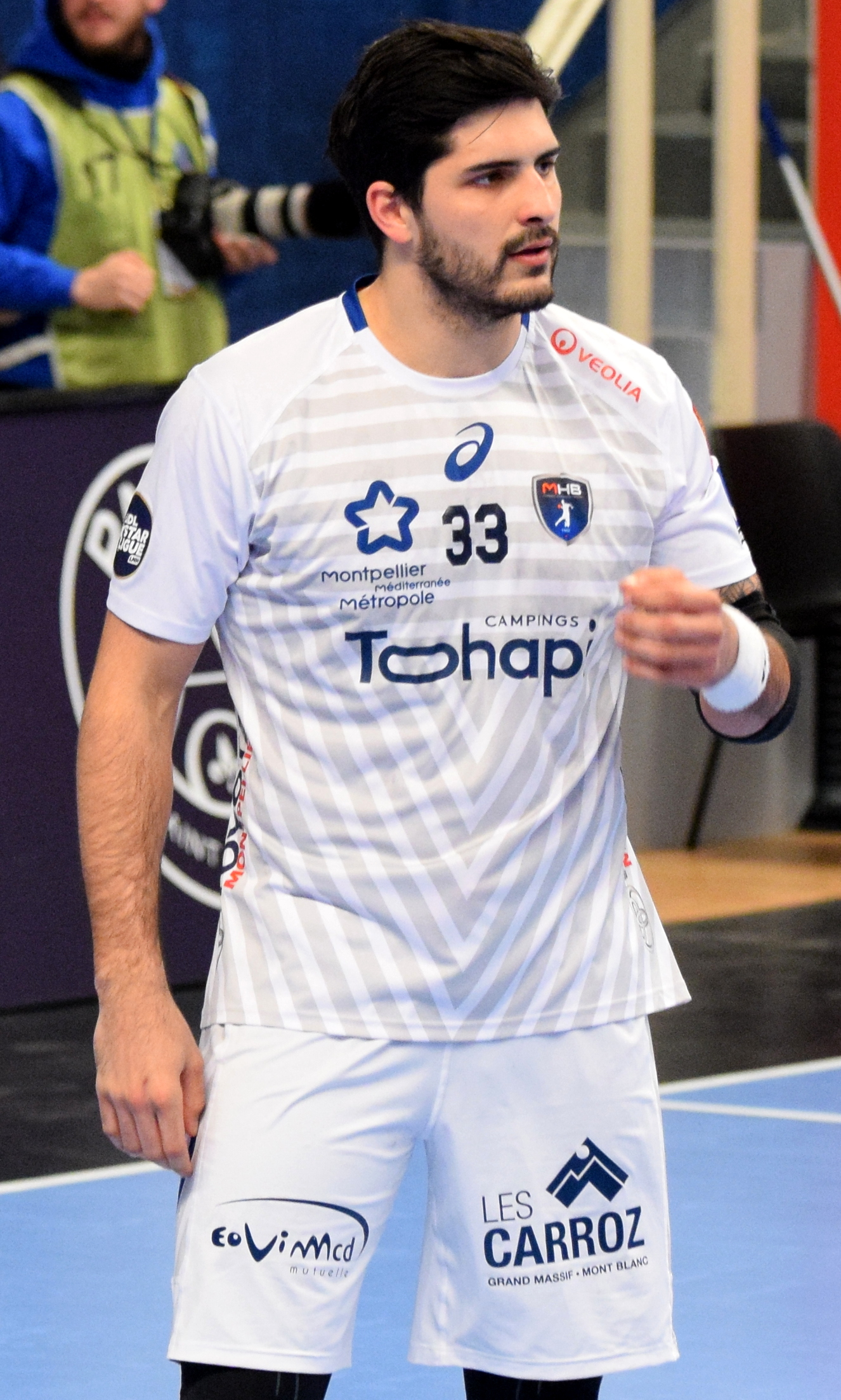 Rencontre de championnat entre le PSG et Montpellier. A Coubertin, le 1er mars 2018.